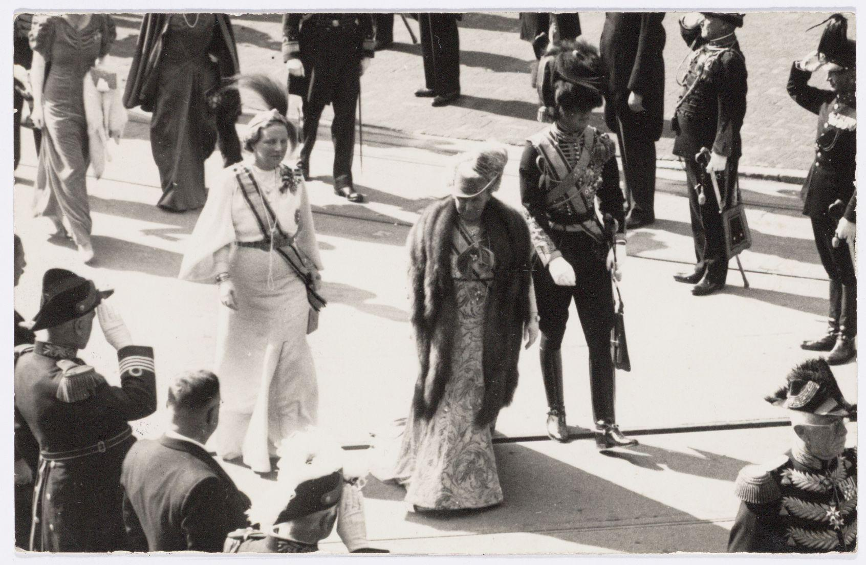 Beschrijving 40-jarig jubileum van koningin Wilhelmina (1898-1938) Prinses Juliana (links) en koningin Wilhelmina op weg naar de Nieuwe Kerk op de Dam. Documenttype foto Vervaardiger Onbekend Anoniem Collectie Collectie Stadsarchief Amsterdam: foto-afdrukken Datering september 1938 Geografische naam Dam Gebouw Nieuwe Kerk Inventarissen Afbeeldingsbestand 010003047648